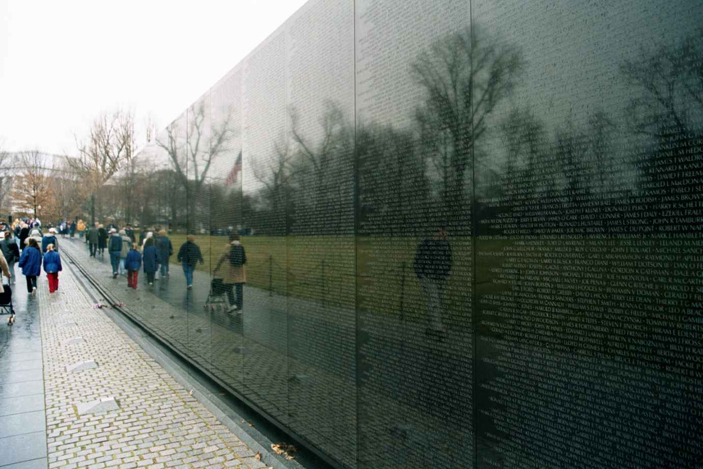 Vietnam Denkmal in Washington D.C. (März 2002), Fotograf: SDü